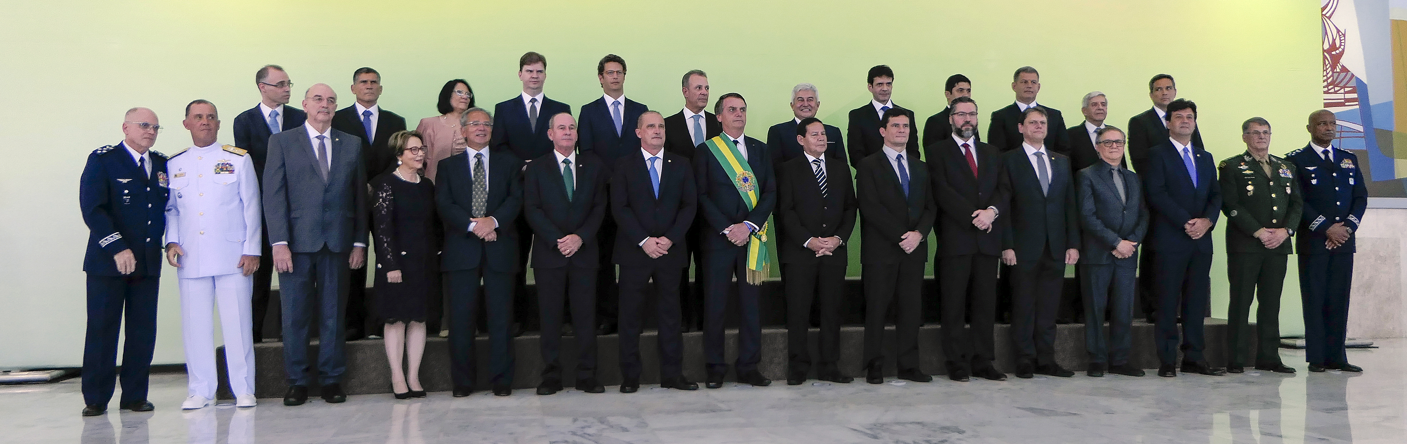 O presidente Jair Bolsonaro dá posse à equipe ministerial no Palácio do Planalto. Participam: presidente da República, Jair Bolsonaro; ministro da Casa Civil, Onyx Lorenzoni; ministro da Defesa, general Fernando Azevedo; ministro das Relações Exteriores, Ernesto Araújo; ministro da Economia, Paulo Guedes; ministro de Infraestrutura, Tarcísio Freitas; ministra da Agricultura, Pecuária e Abastecimento, Teresa Cristina; ministro da Educação, Ricardo Rodrigues; ministro da Cidadania, Osmar Terra; ministro da Saúde, Luiz Henrique Mandetta; ministro de Minas e Energia, Almirante Bento Costa Lima; ministro da Ciência, Tecnologia, Inovações e Telecomunicações, Marcos Pontes; ministro do Meio Ambiente, Ricardo Salles; ministro do Turismo, Marcelo Antonio; ministro do Desenvolvimento Regional, Gustavo Canuto; ministra dos Direitos Humanos, Damaris Alves; ministro da Secretaria-Geral da Presidência, Gustavo Bebianno; ministro da Transparência, Wagner Rosário; ministro da Justiça, Sergio Moro; ministro da Secretaria de Governo da Presidência da República, general Carlos Alberto Cruz; ministro de Segurança Institucional, General Augusto Heleno; ministro da Advocacia-Geral da União, André Luiz Mendonça; presidente do Banco Central, Roberto Campos Neto. Foto: Roque de Sá/Agência Senado